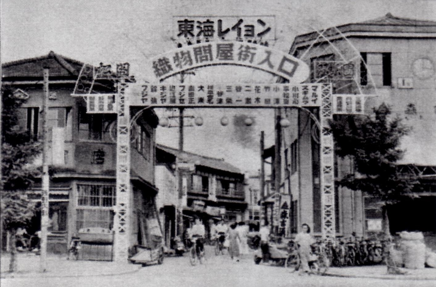 毛織物の街、愛知県一宮市。織物問屋街入口。東海レイヨンの看板が確認できる。